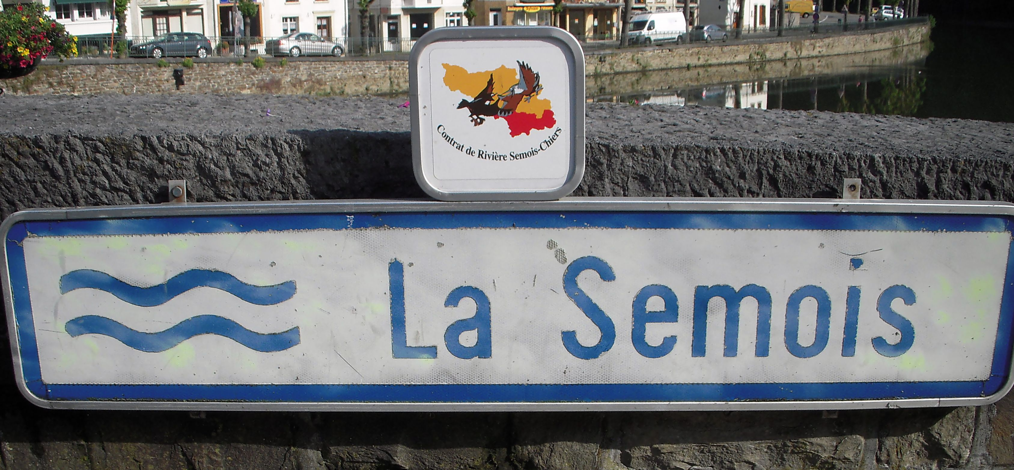 Skilt på kajen i Bouillon, Belgien. Juni 2013.